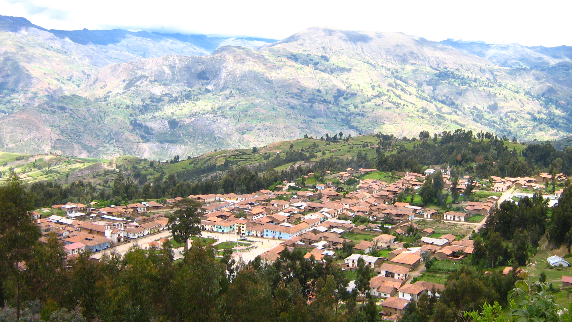 Foto panorámica del distrito de Piscobamba en formato High Definition 16:9 tomada el 01-02-11.